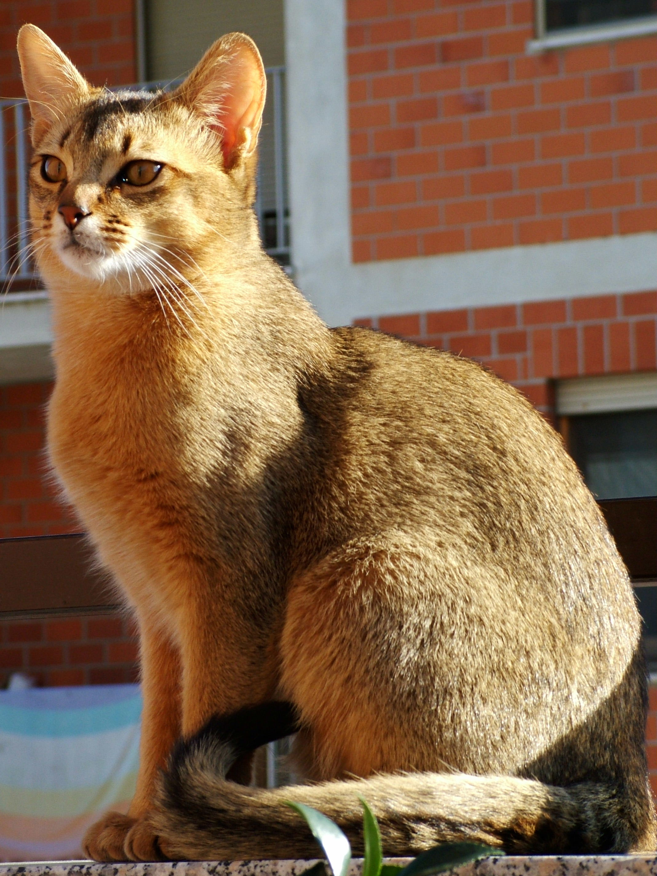 TirnanOg's Artù, abissino lepre